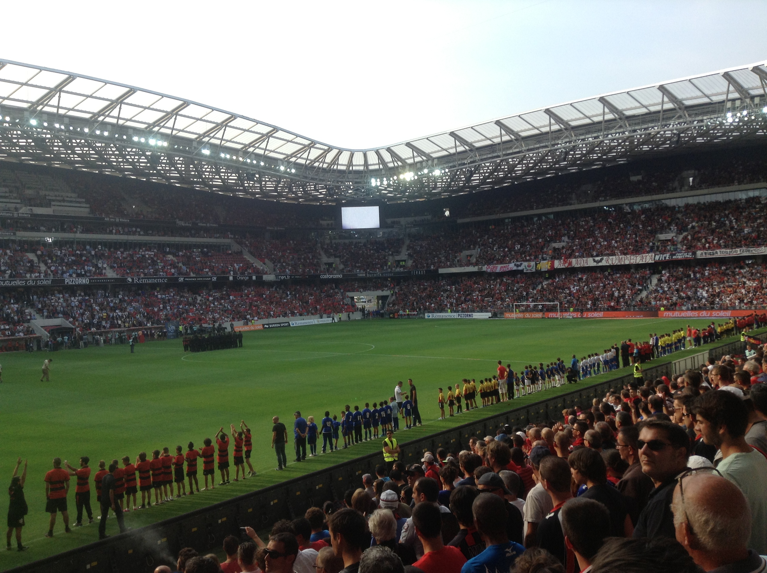 L'Allianz Riviera le 22 septembre 2013.